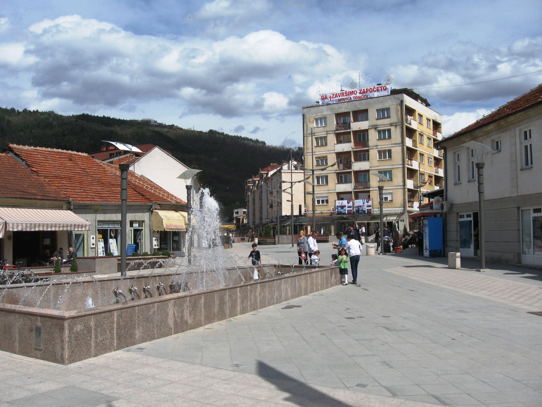 Средиште Сурдулице.